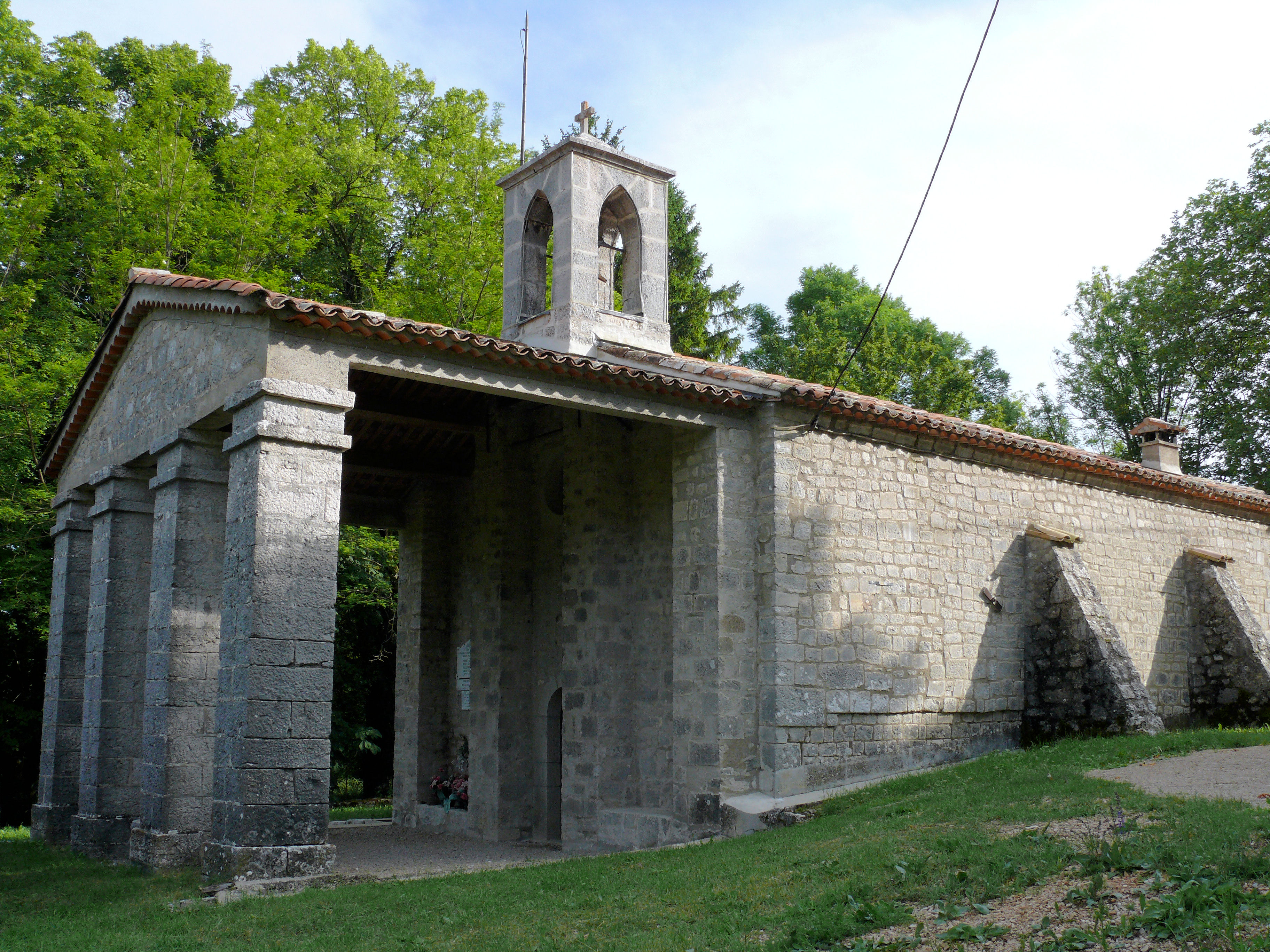 Caussols - L'église Saint-Lambert